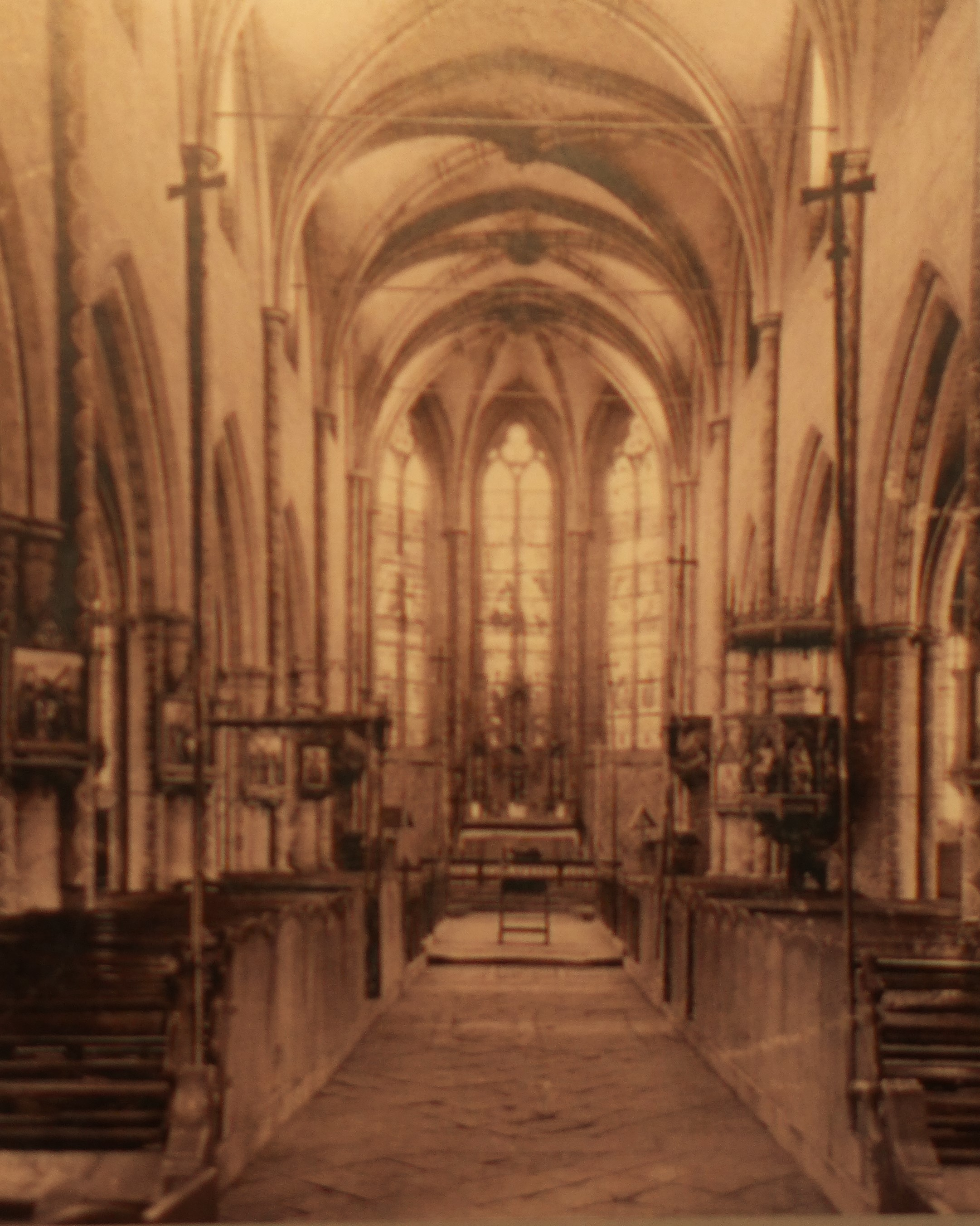 St. Mauritius (Tholey), Innenansicht der Kirche mit neogotischer Ausstattung und ornamentaler Ausmalung